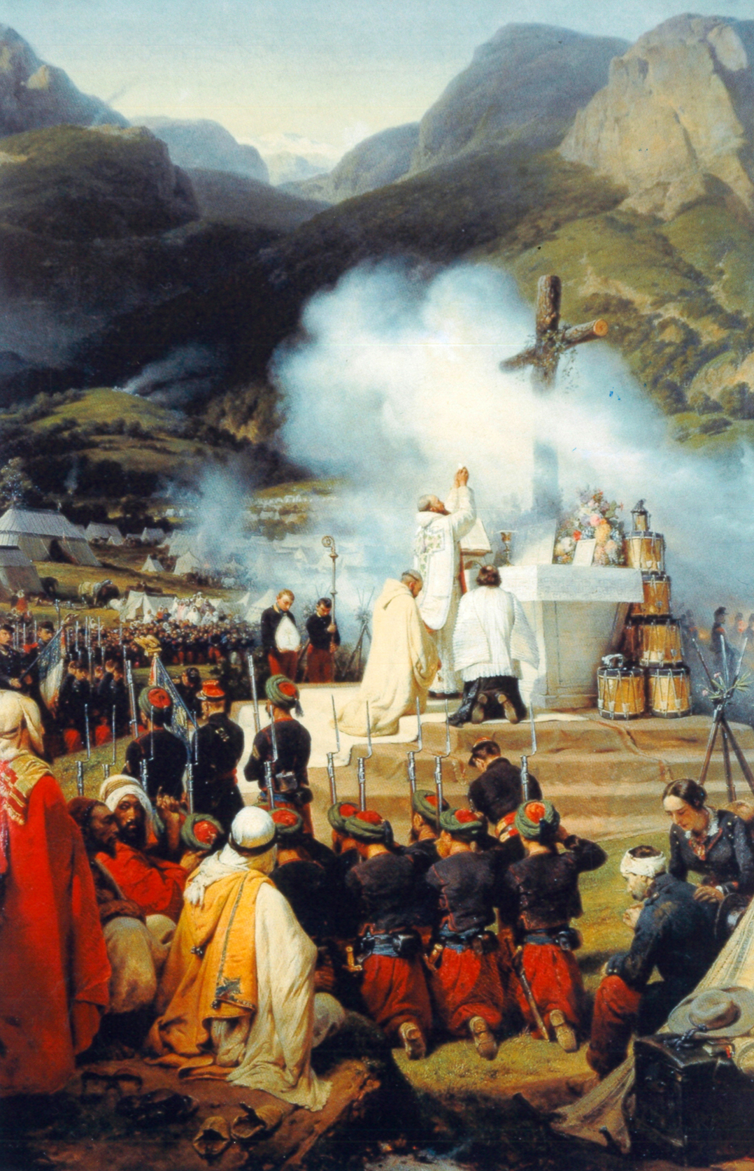 Le père Dom François Régis (1808-1880), abbé de Notre-Dame de Staouëli, célèbre la messe sur les rives de l’Oued-Agrioun au Sud-Est d’Alger, le 14 juin 1853. Prosterné derrière le révérend père Régis figure le père Thomas d’Aquin. Cet épisode se déroule à l'issue de la campagne des Babors menée par le maréchal Randon. Dans une lettre au père régis du 25 mai 1854, Horace Vernet commente son œuvre: « Le moment que j’ai choisi est celui de l’élévation, lorsque le canon remplaçait la sonnette, et la fumée de la poudre, l’encens. »